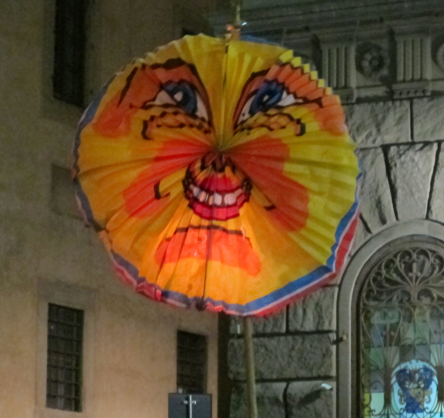 Festa della rificolona 2011